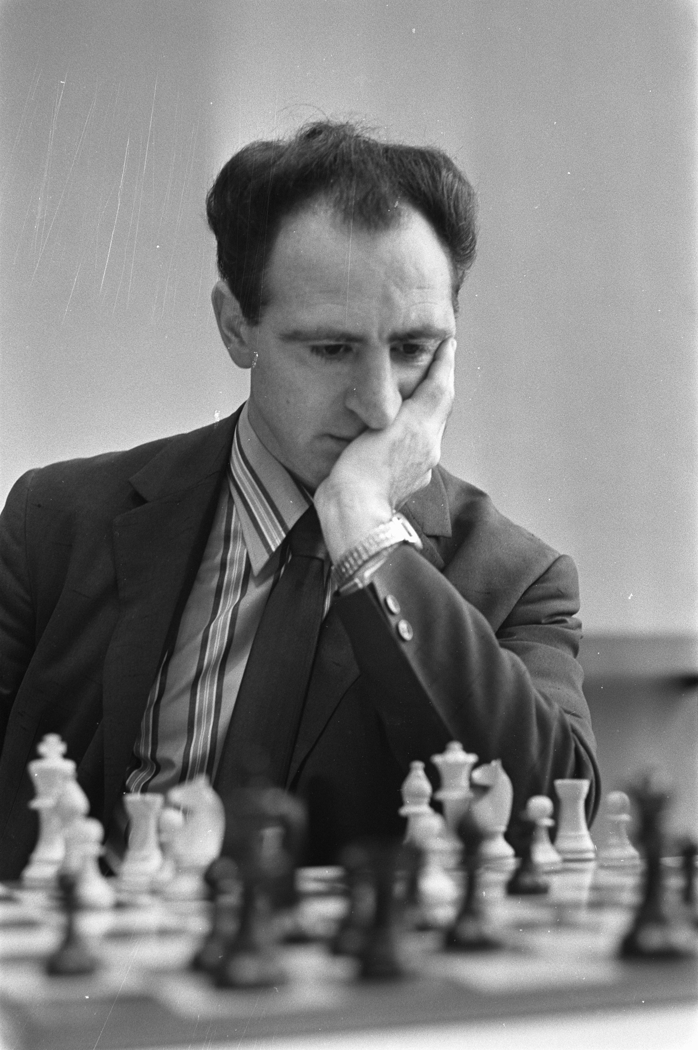 Collectie / Archief : Fotocollectie Anefo Reportage / Serie : IBM-schaaktoernooi 1972 in de RAI te Amsterdam Beschrijving : De Russische schaker Lev Poloegajevski Datum : 5 juni 1972 Locatie : Amsterdam, Noord-Holland Trefwoorden : schaken Persoonsnaam : Poloegajevski, Lev Instellingsnaam : IBM-Schaaktoernooi Fotograaf : Fotograaf Onbekend / Anefo Auteursrechthebbende : Nationaal Archief Materiaalsoort : Negatief (zwart/wit) Nummer archiefinventaris : bekijk toegang 2.24.01.05 Bestanddeelnummer : 925-6483